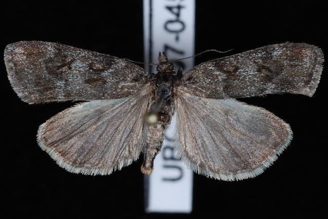 Gesneria centuriella